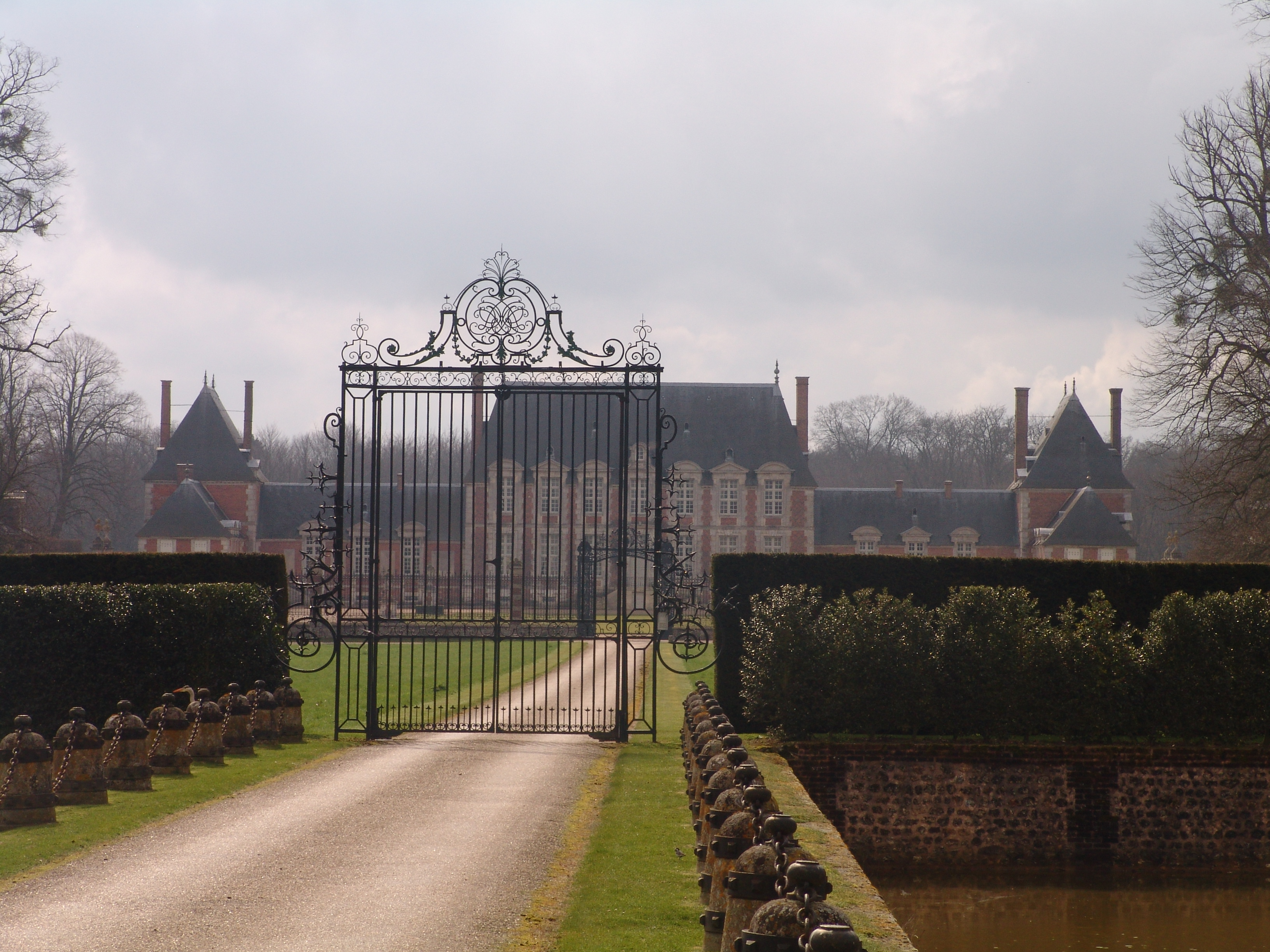 Vue du château et de son portail.